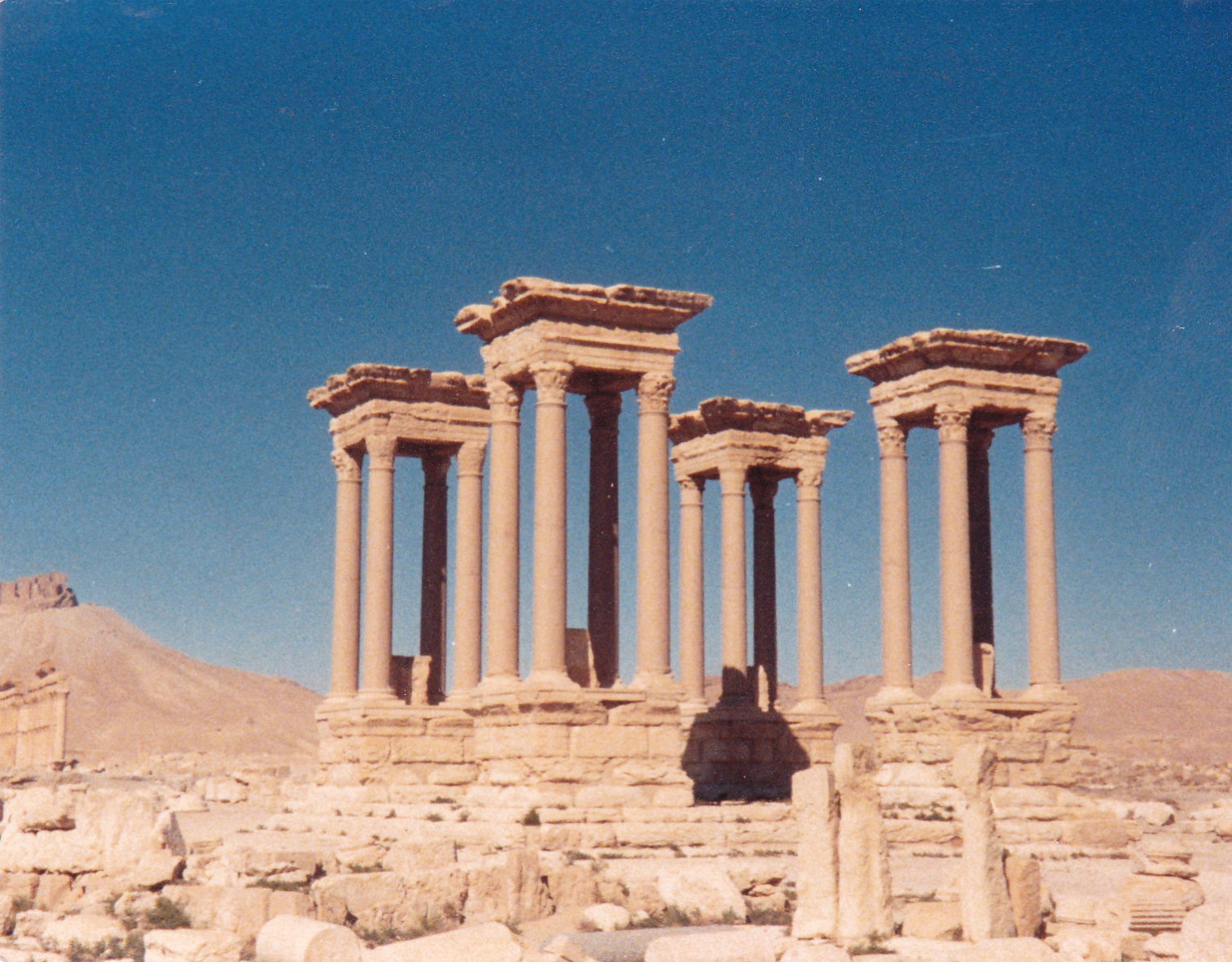 Tetrapylon, Tempel in Palmyra, Syrien